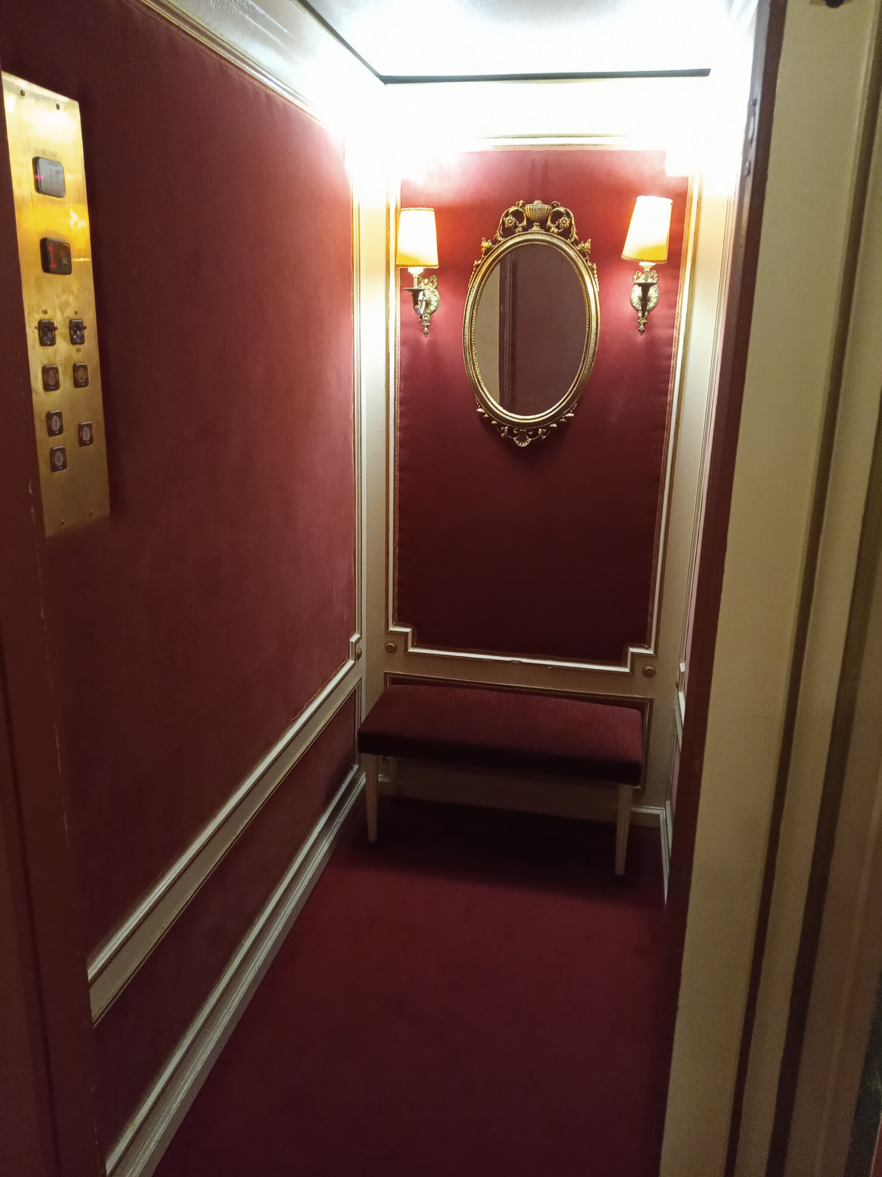 Діючий ліфт в палаці Ахілліон